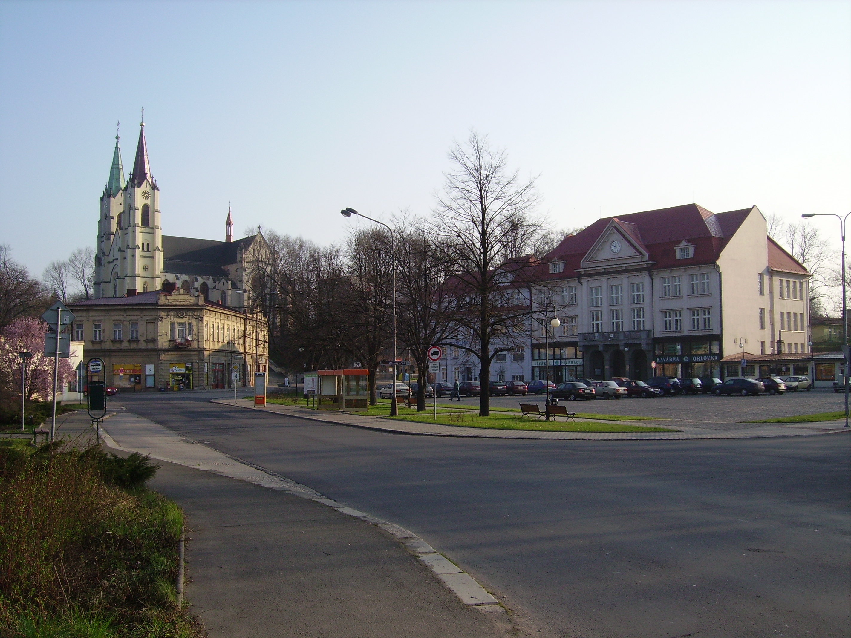 Orlova_sq01.JPG